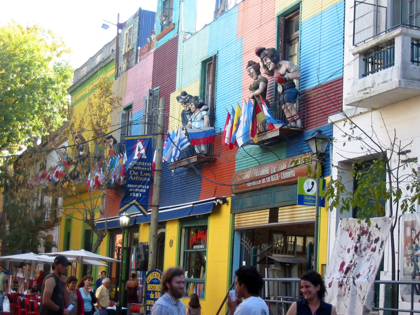 Caminito. Barrio La Boca. Buenos Aires / Argentuan